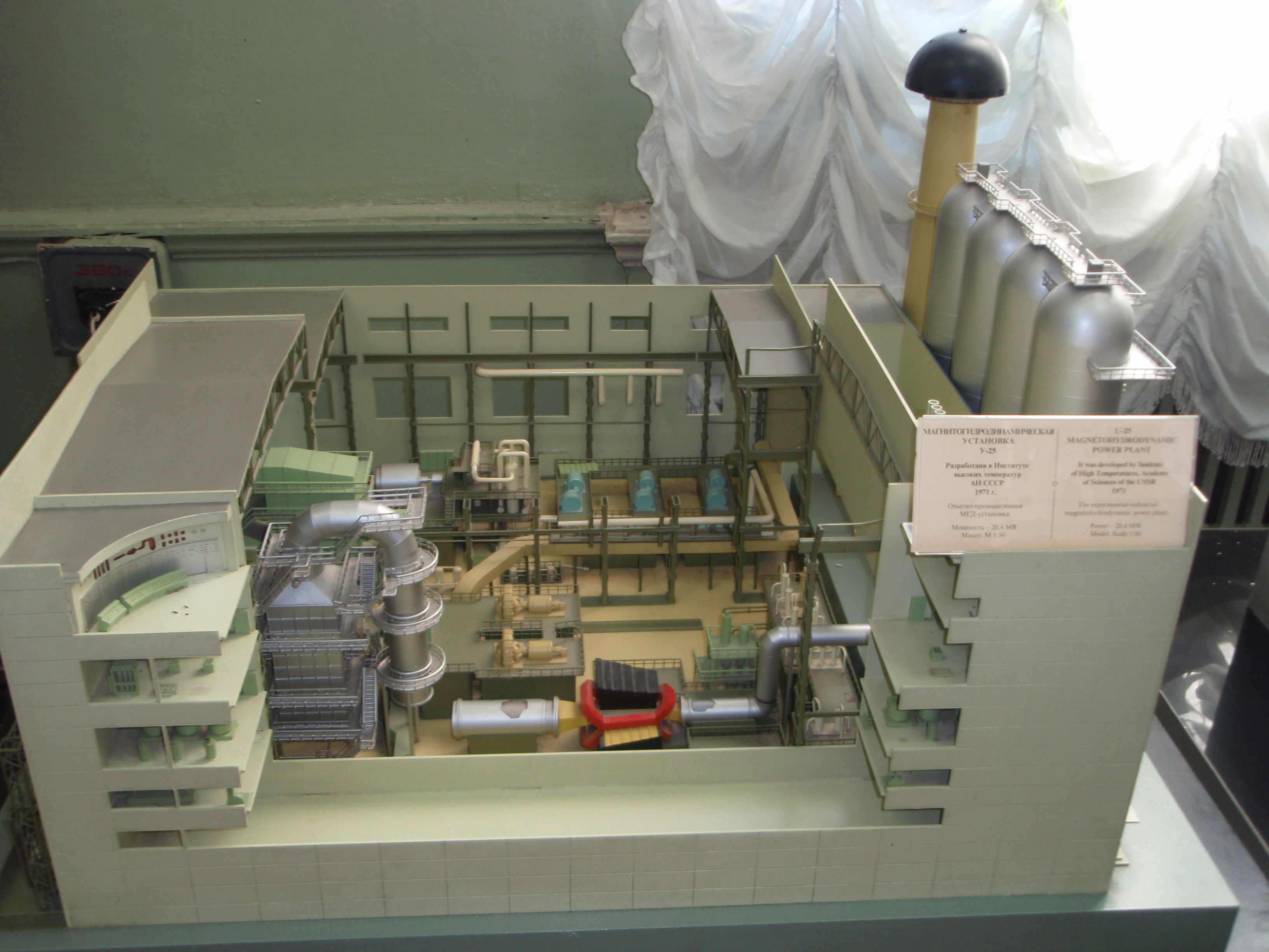 Модель магнитогидродинамической установки У-25, Государственный Политехнический музей (г.Москва)